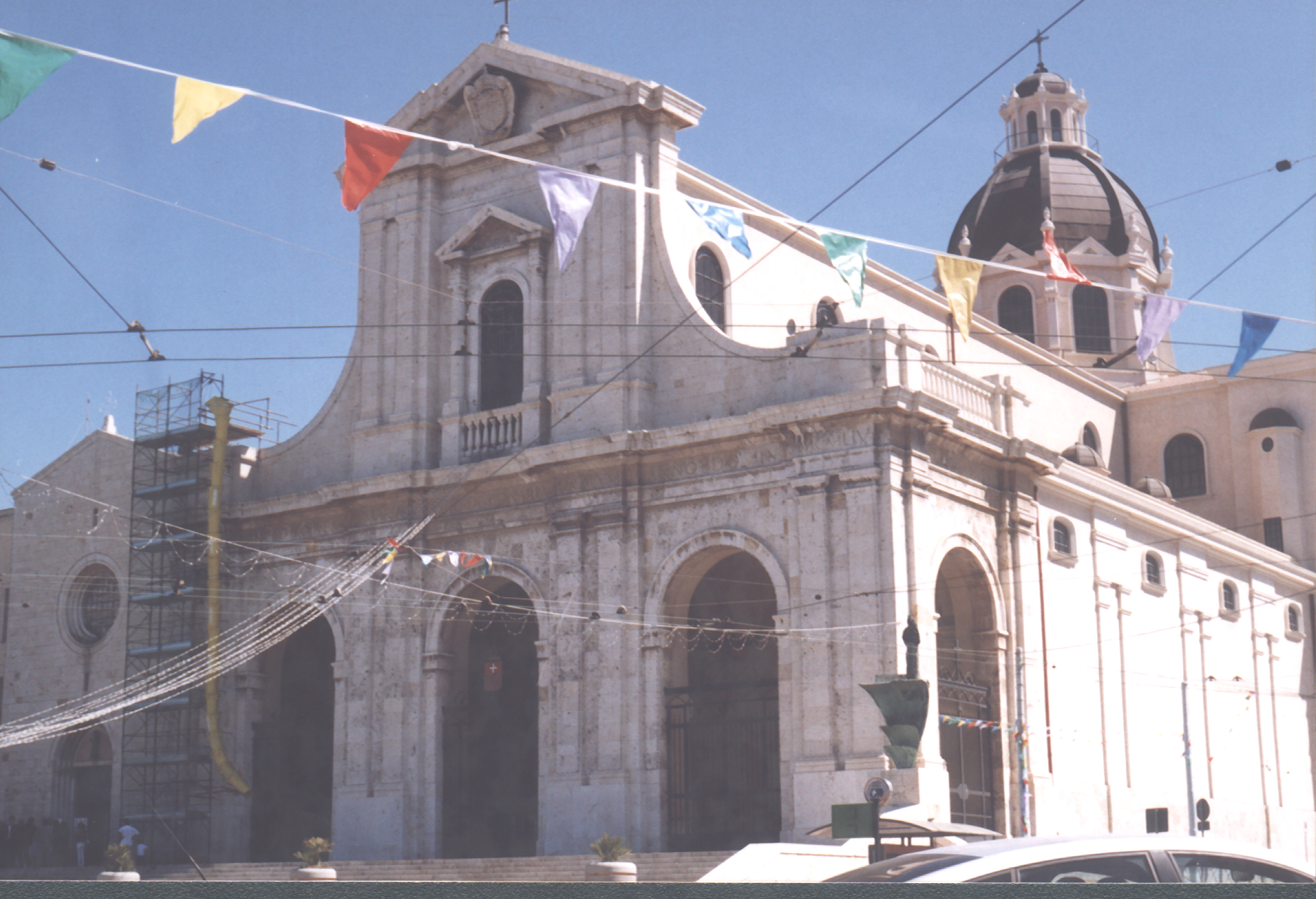 Cagliari, basilica di Nostra Signora di Bonaria